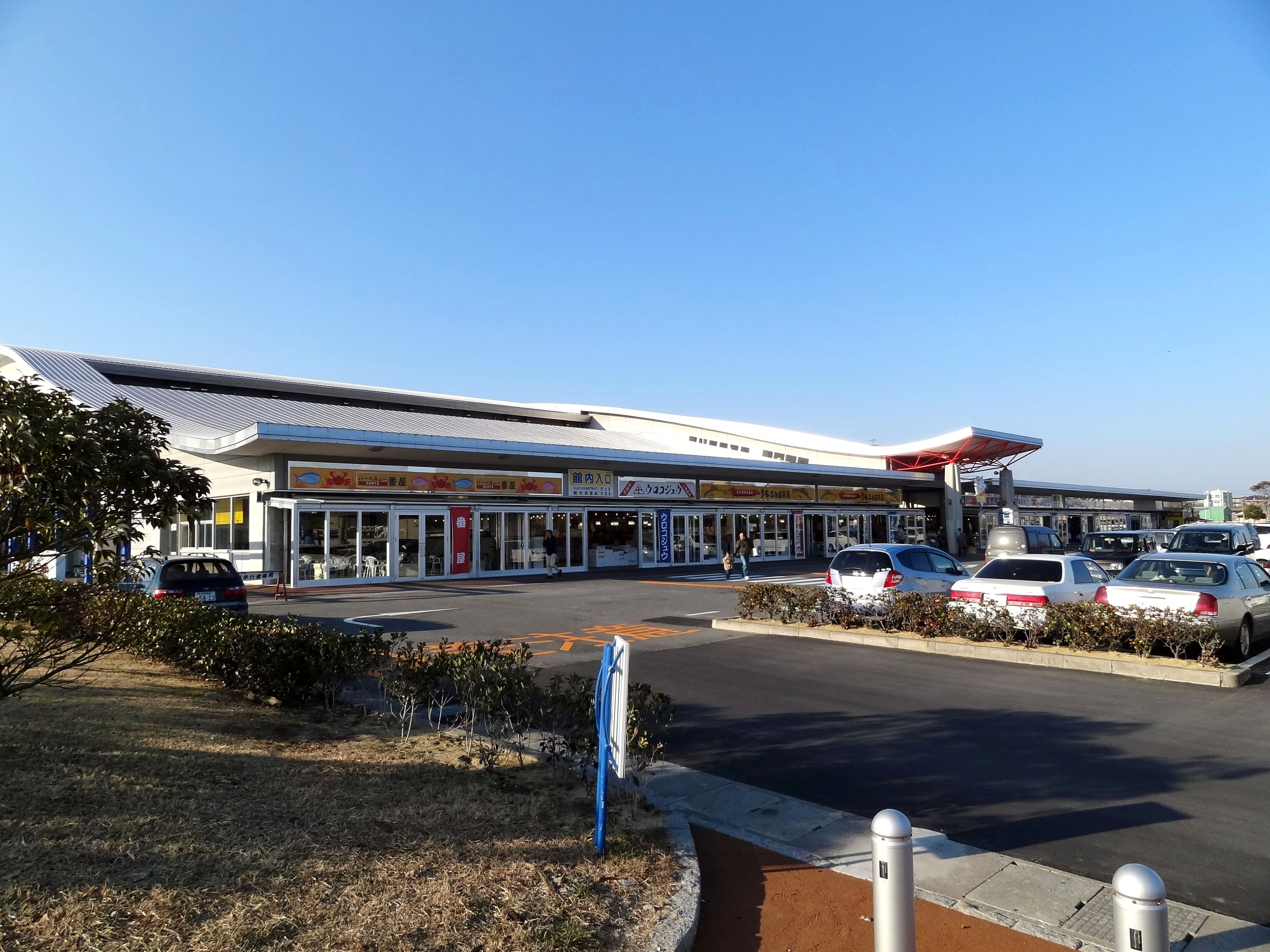 いわき・ら・ら・ミュウ